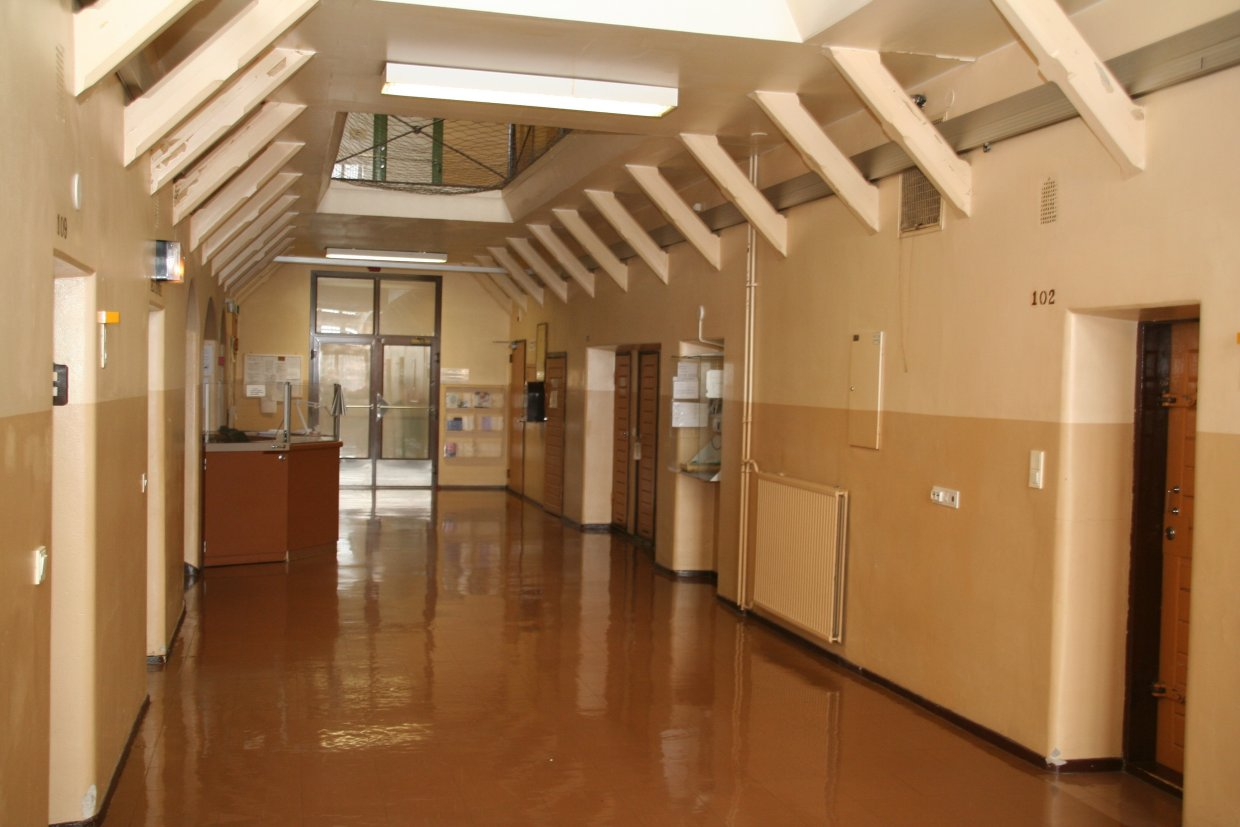 Kuopion vankila, sisäkuva